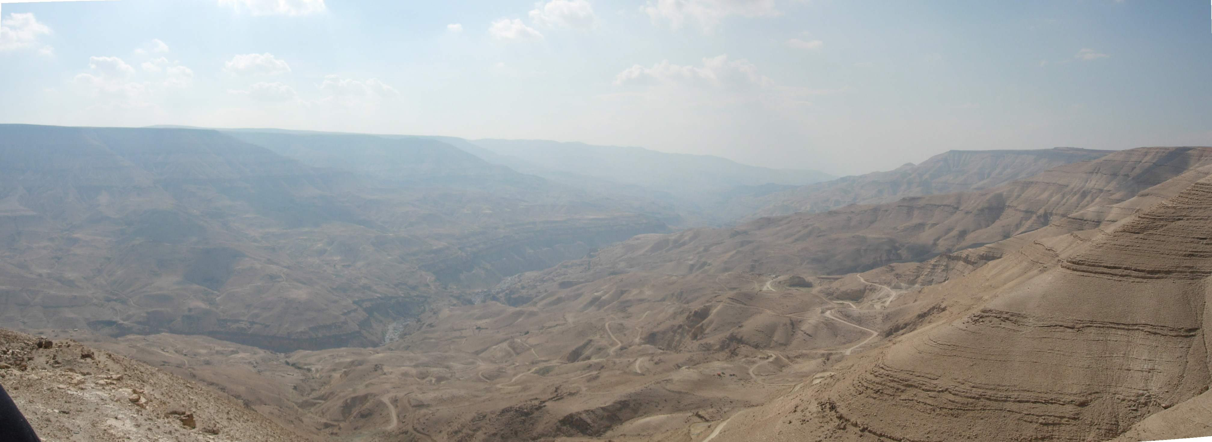 Photo personnelle. Wadi al'mujib 70 km au sud d'Amman, Jordanie.